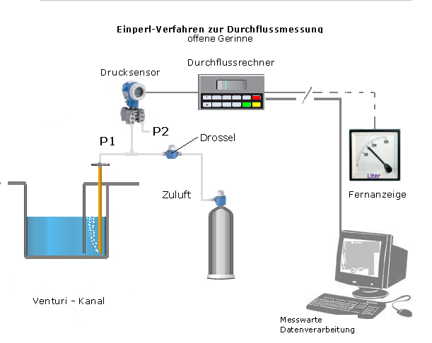 Messanordnung Venturi-Kanal mit Einperl-Verfahren